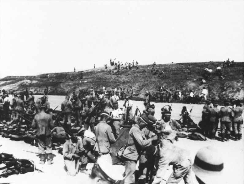 Schutzgebiet Kiautschou Vorderste deutsche Frontlinie (Kamp um Tsingtau, 1914)